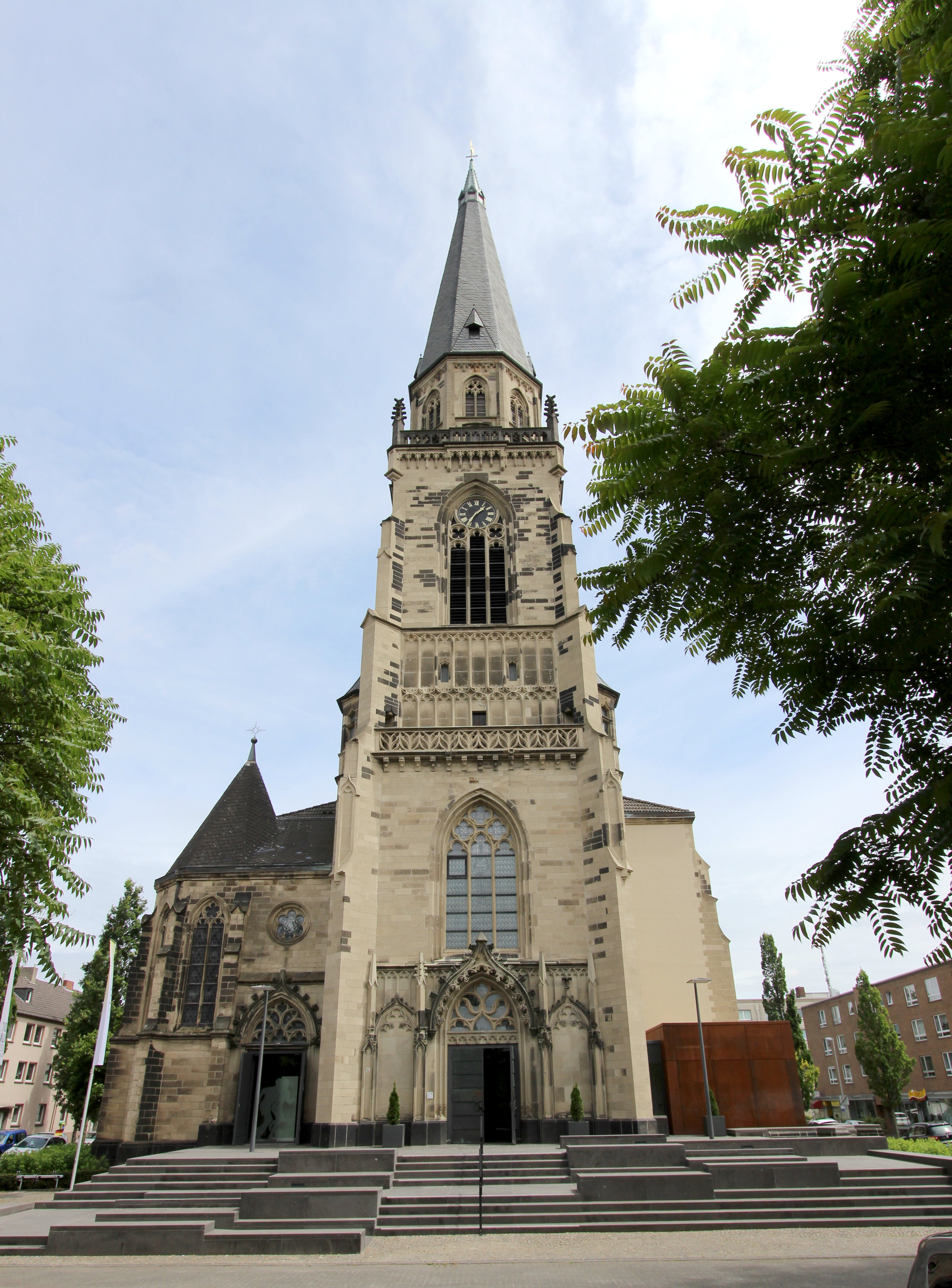 41236 Mönchengladbach-Rheydt. St. Josef Kirche, Bauzeit: 1903-1905, Adresse: Keplerstraße 75a in Mönchengladbach (OT Ry-Mitte), Eintrag in die Denkmalliste: 14.10.1986. Aufnahme von 2018.